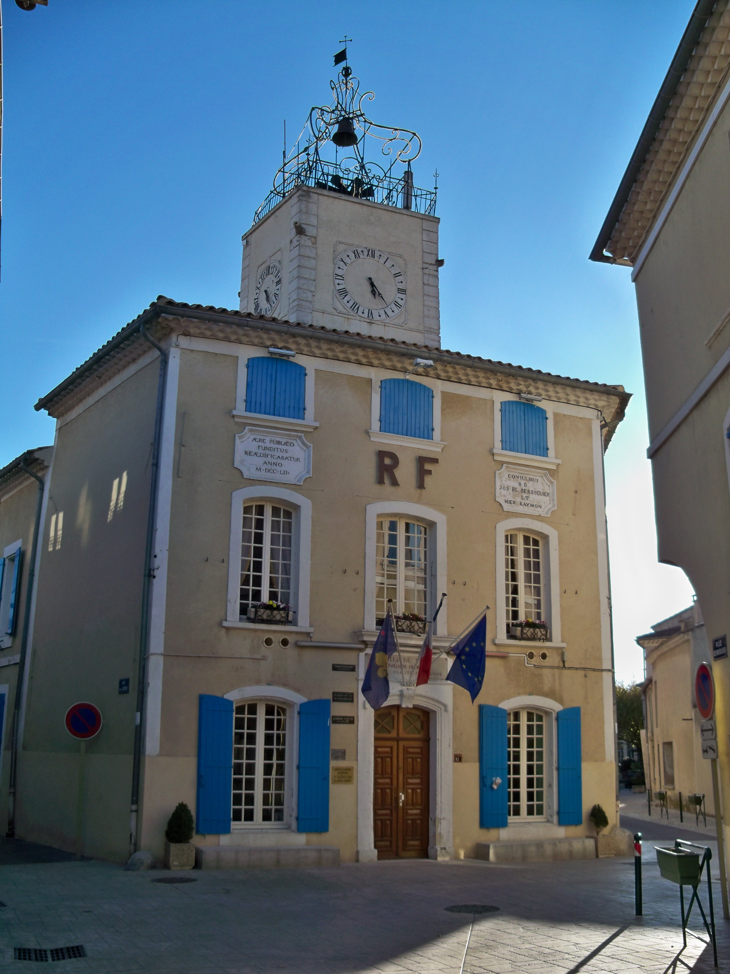 Mairie de Caderousse, Vaucluse, France